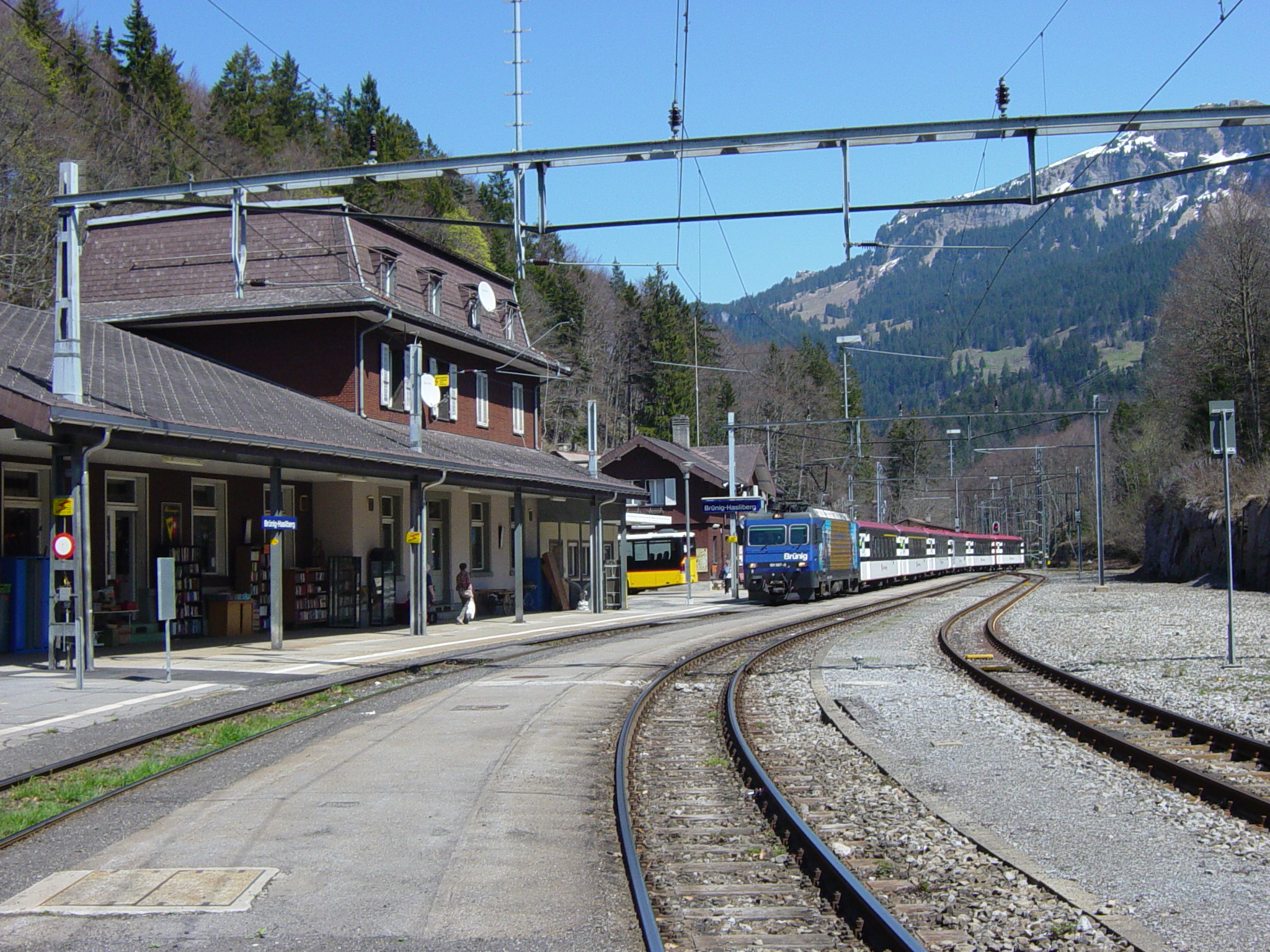 InterRegio Luzern-Interlaken approaching station of Brünig-Hasliberg